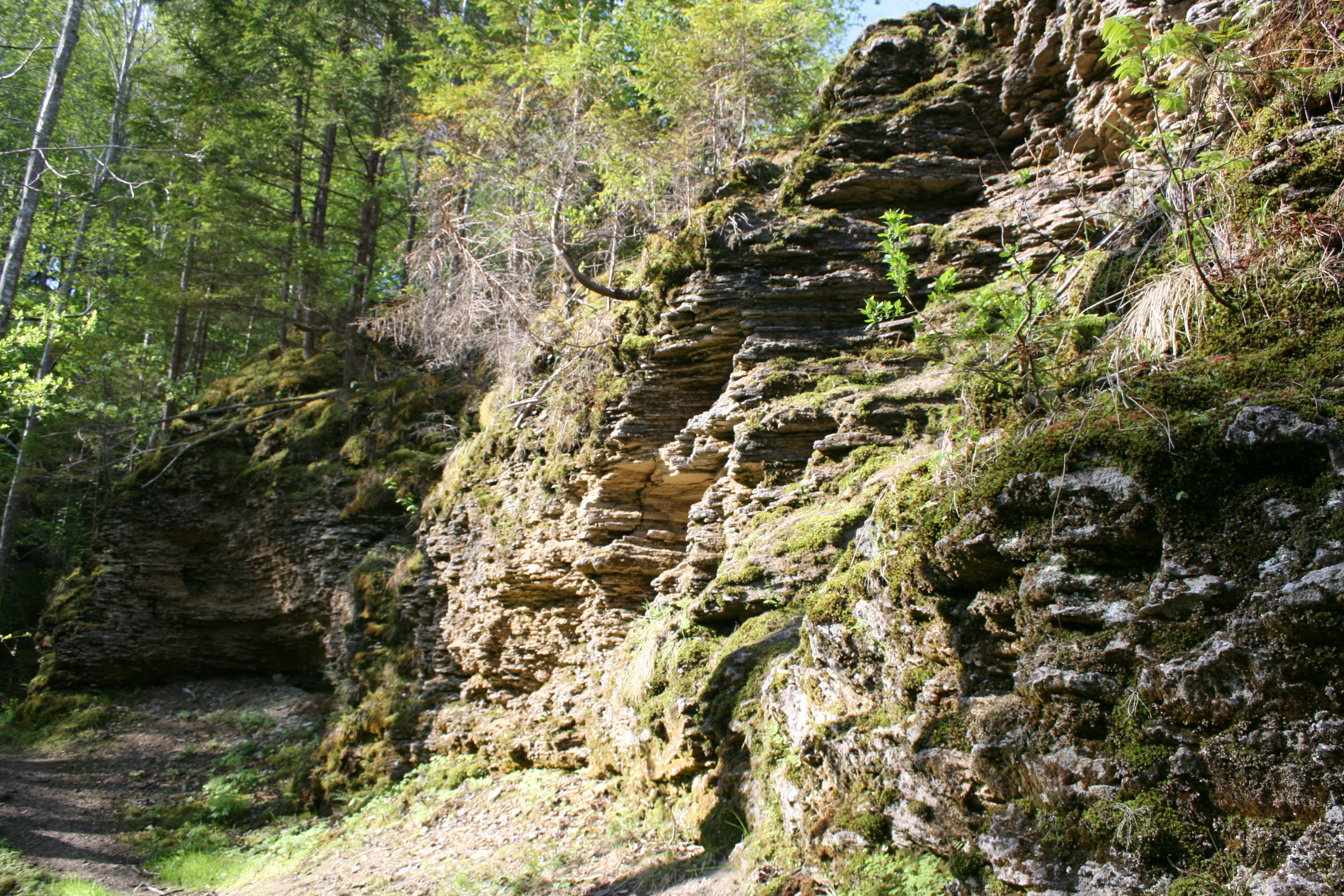 Kazugrava.Šūnakmens krauja.Travertine cliff